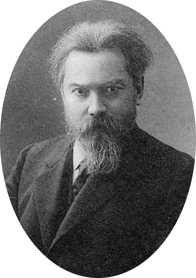 Князь Сергей Сергеевич Волконский, член Государственной думы от Пензенской губернии.